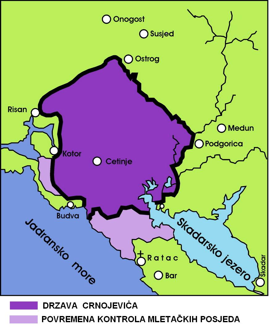 Država Crnojevića